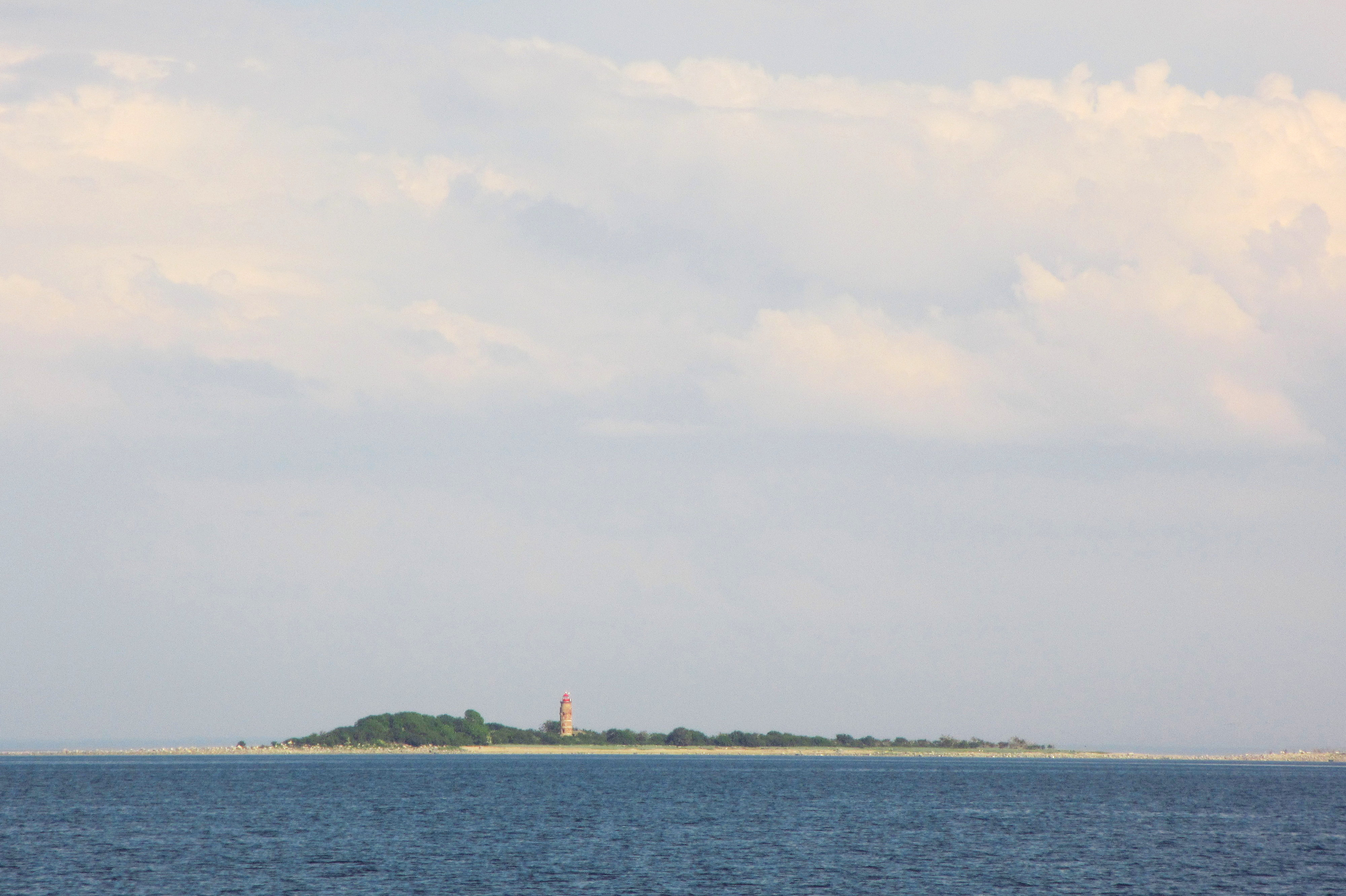 Sorgu saar